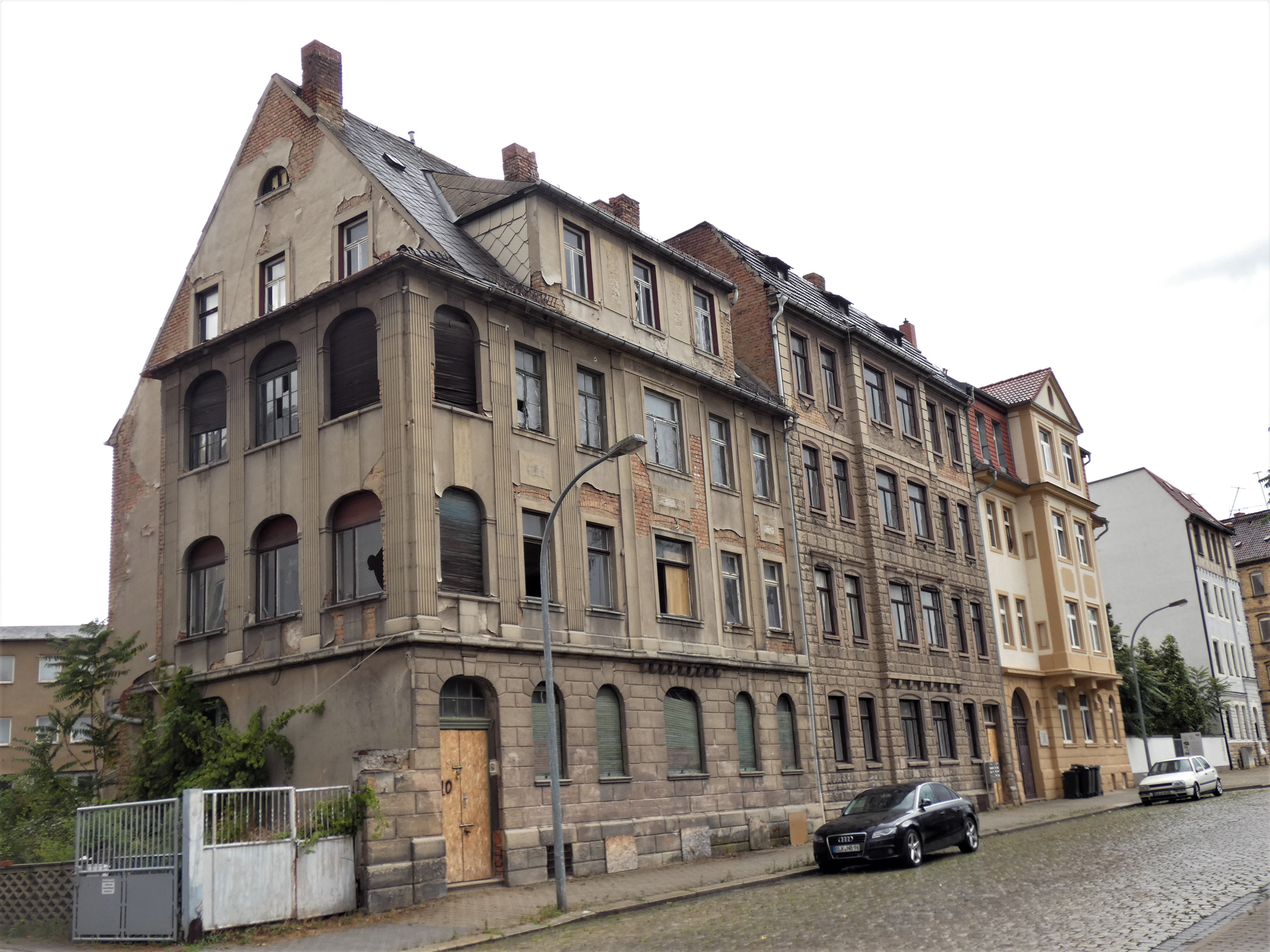 Straßenzeile Nordstraße 10, 12, 14, 16 in Weißenfels